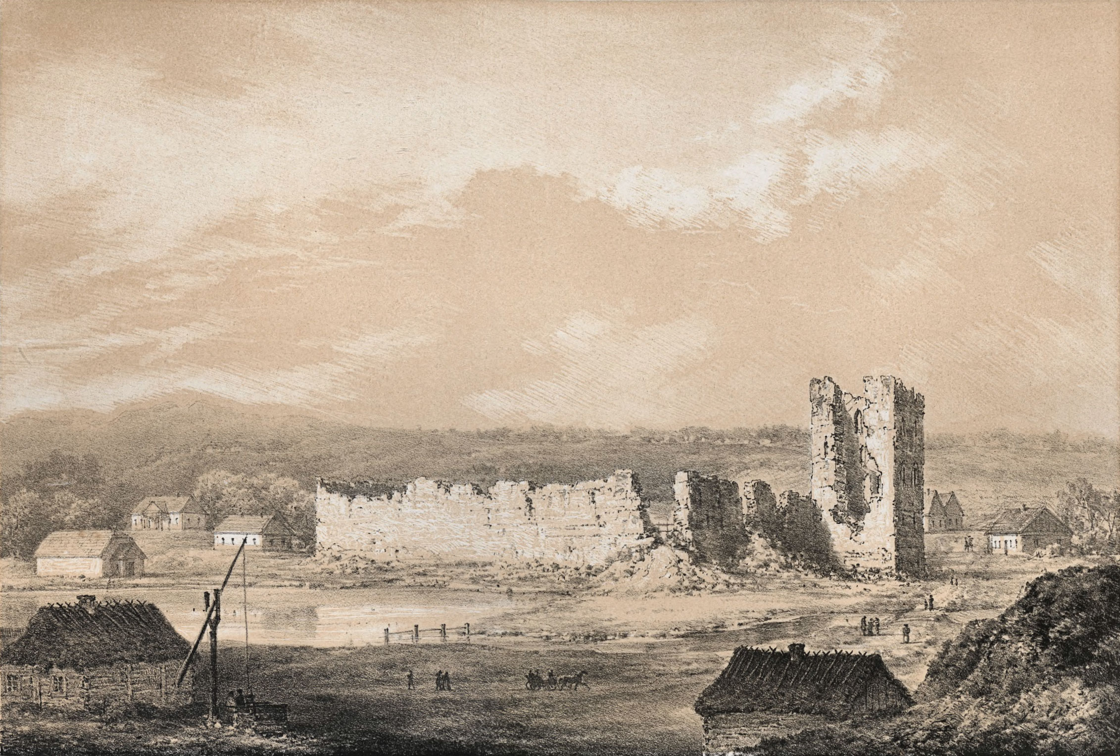 Беларуская (тарашкевіца): Крэва (Kreva). Замак